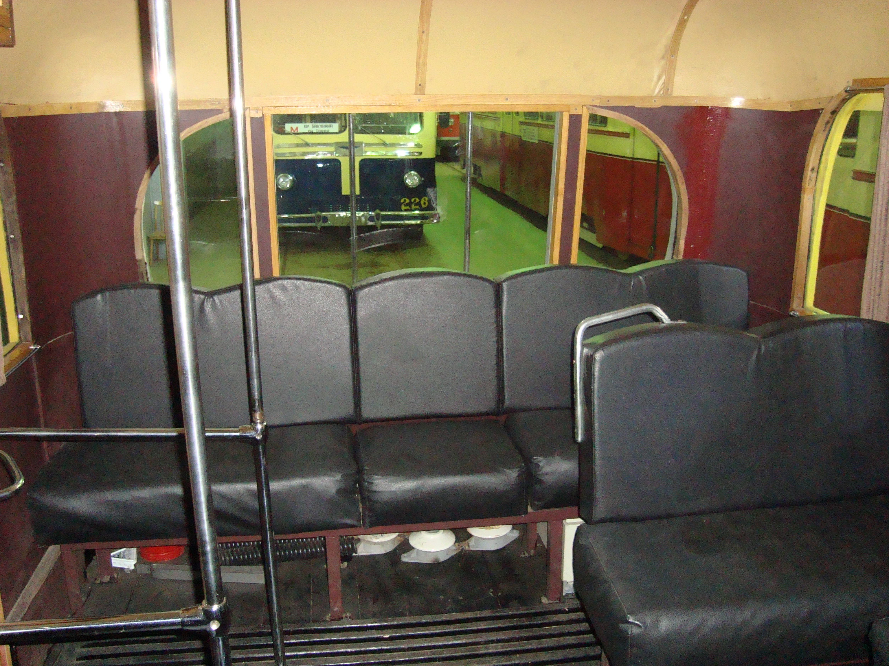 Задняя часть салона